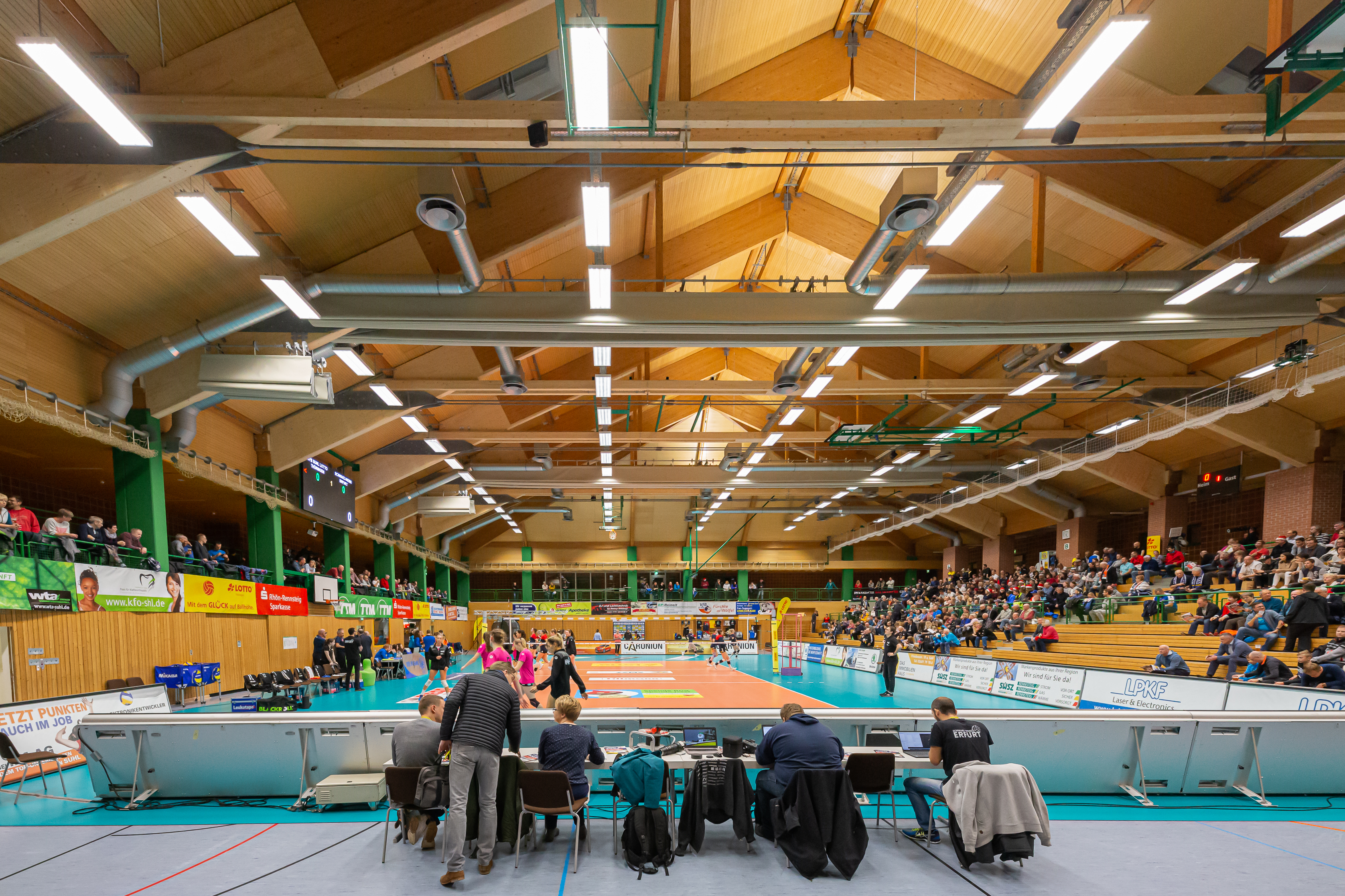 Volleyball, 1. Bundesliga Frauen, VfB 91 Suhl Lotto Thüringen - Schwarz-Weiss Erfurt; Sporthalle Wolfsgrube